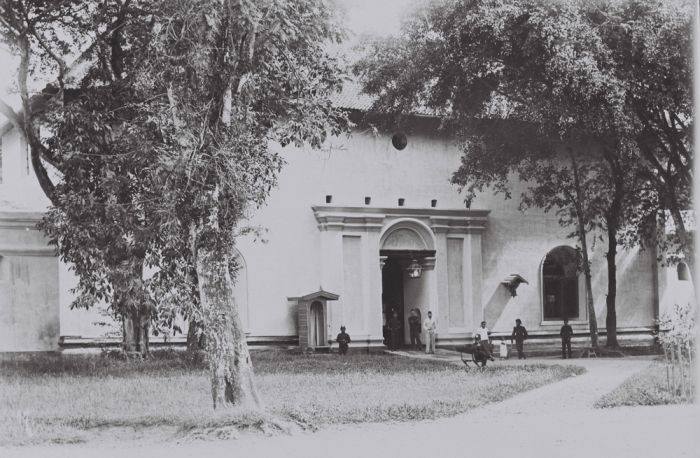 foto. KNIL militairen met kinderen voor de poort van het fort te Palembang